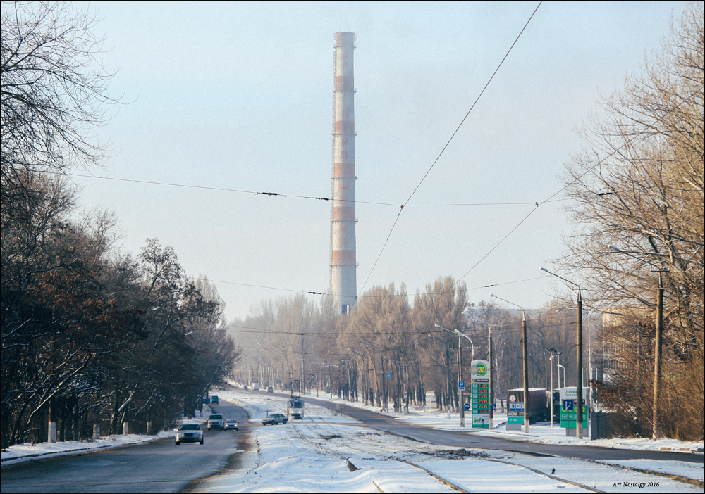 труба "Днепрошины"